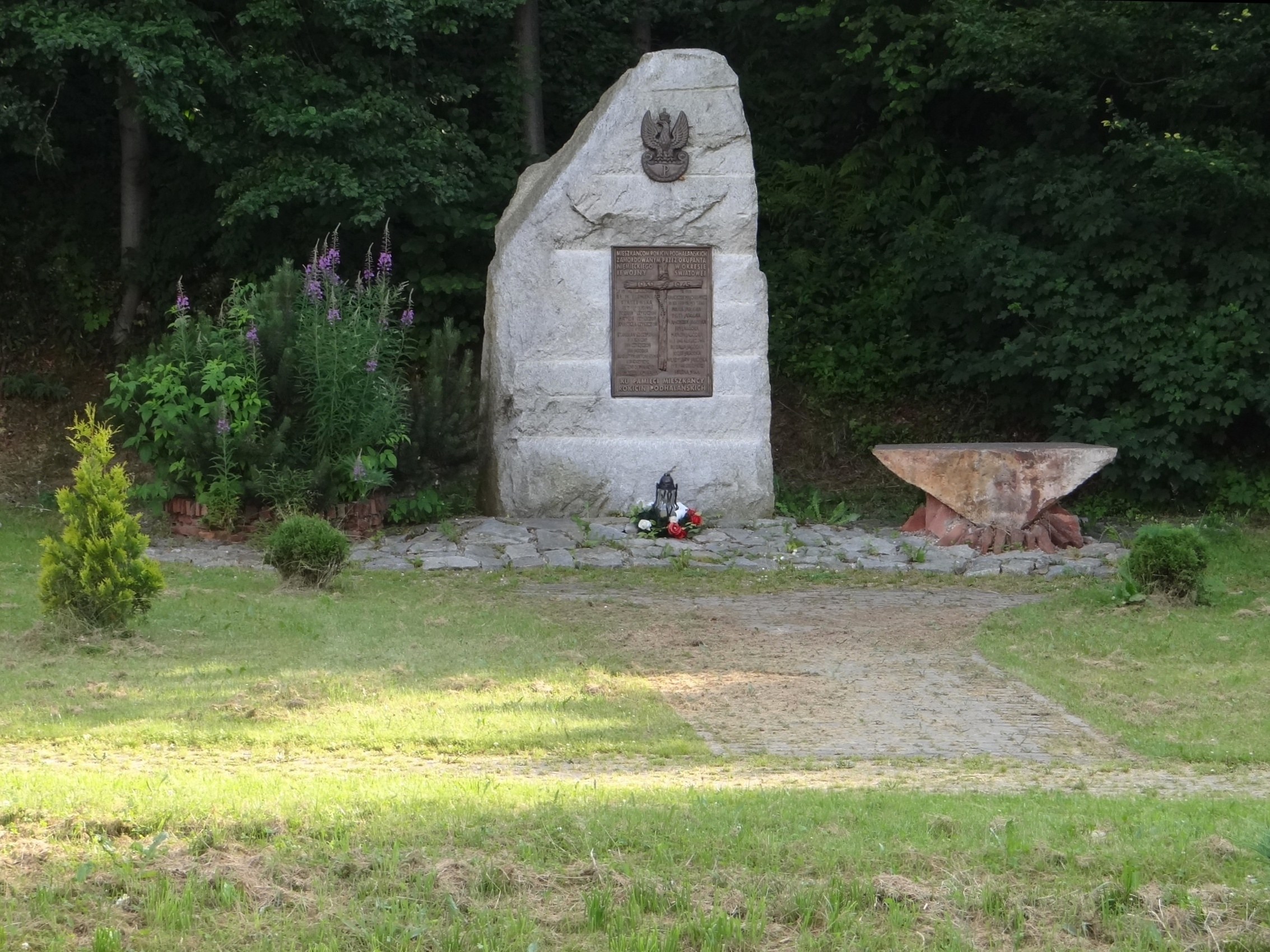 Rokiciny Podhalańskie. Pomnik ofiar faszyzmu